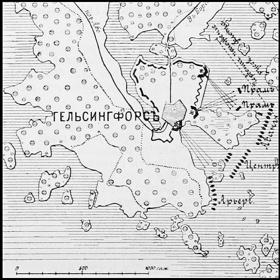 Данное фото было использовано в статье «Гельсингфорс» опубликованной в седьмом томе «Военной энциклопедии», который был издан книгоиздательским товариществом И. Д. Сытина в 1912 году в столице Российской империи городе Санкт-Петербурге.